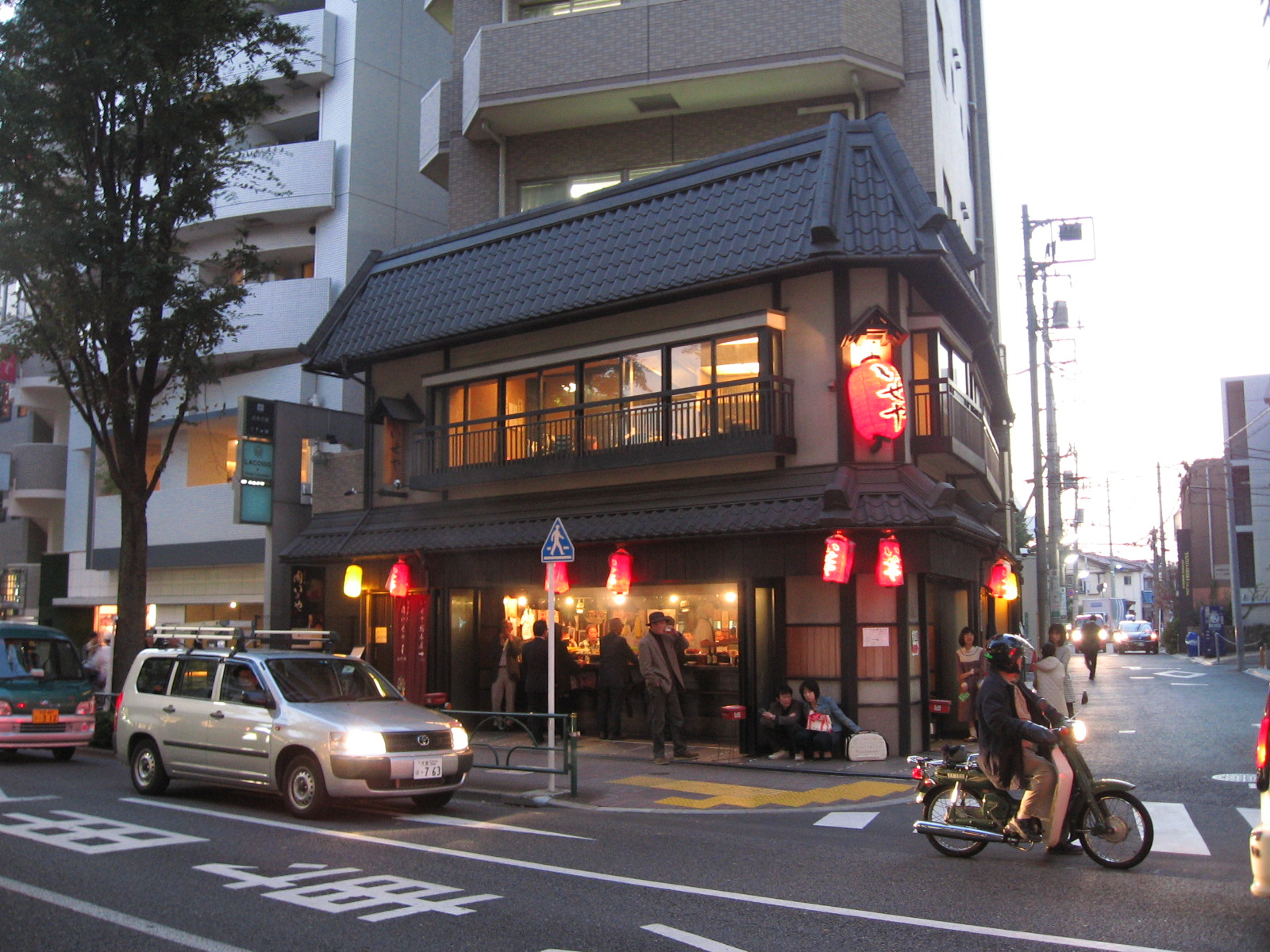 いせや総本店（東京都武蔵野市御殿山）。2012年11月1日撮影。